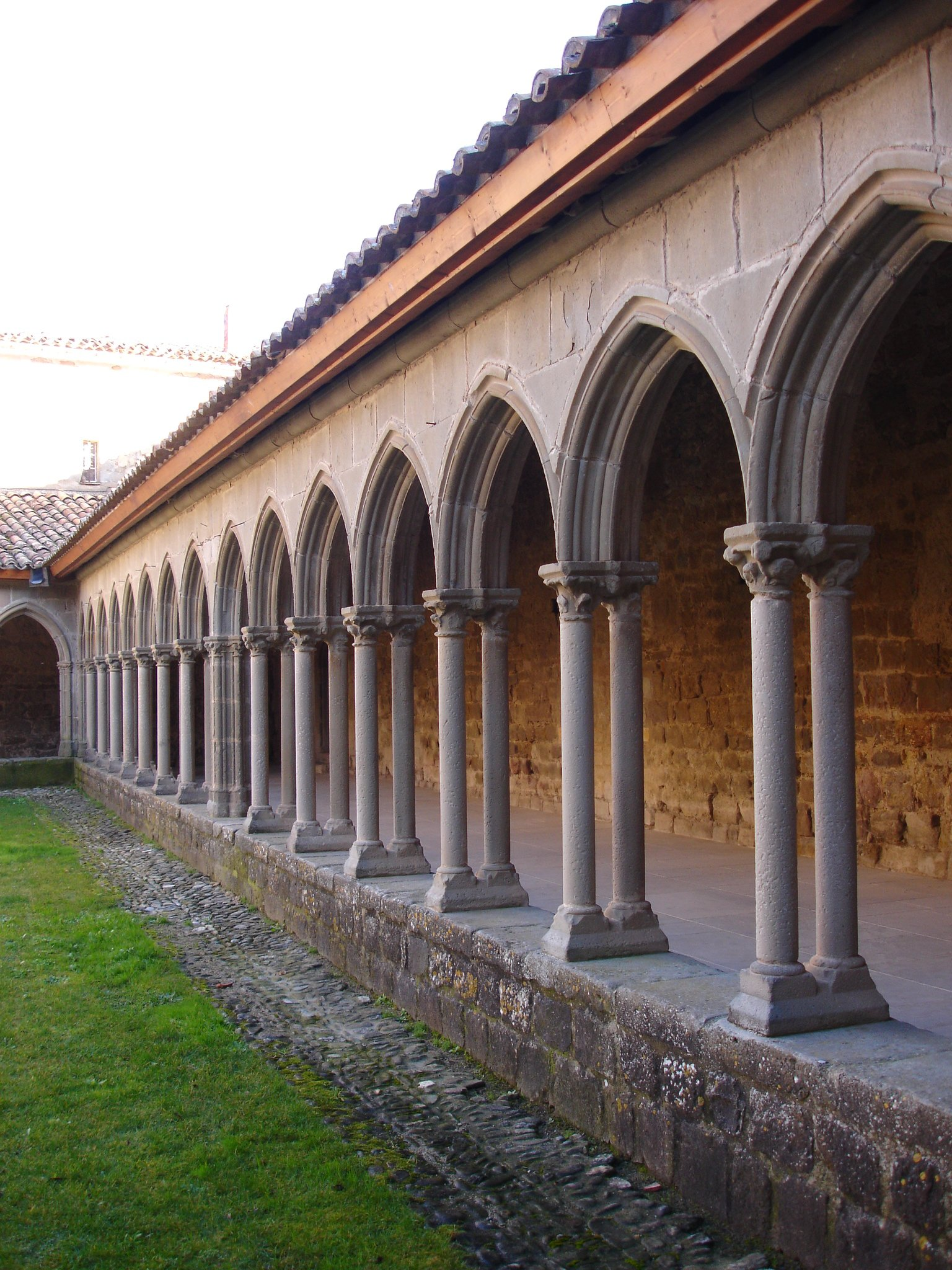 Abbaye de Saint-Hilaire, Aude (11), cloître